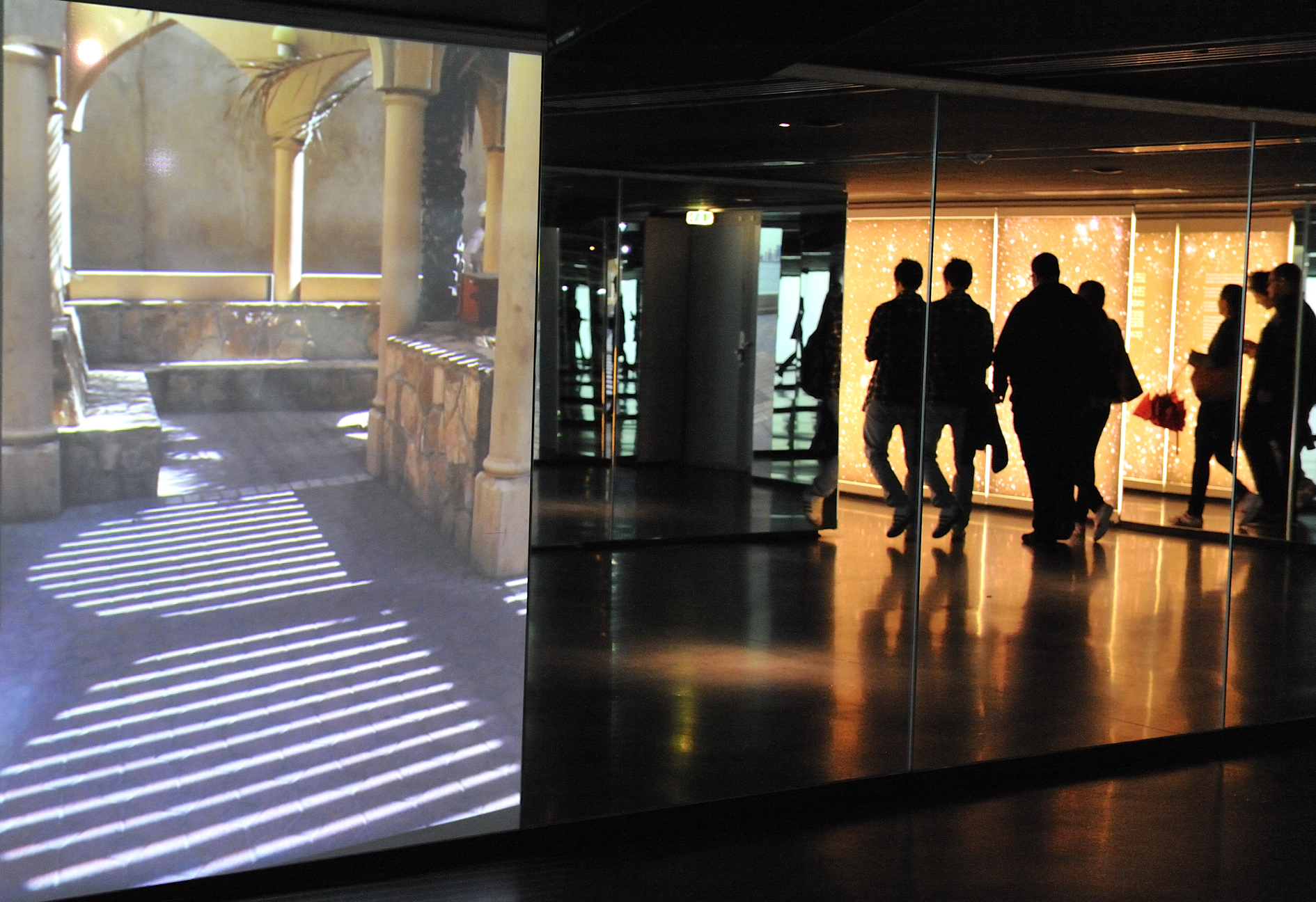 Nuit Blanche Paris 2012 offre l’occasion de parcourir le nouveau musée de l’IMA inauguré à l’occasion de son 25e anniversaire en février dernier qui offre une vision globale, sensible et intégrée de l’aire géographique constitué par les vingt-deux pays arabes cofondateurs de l’Institut.